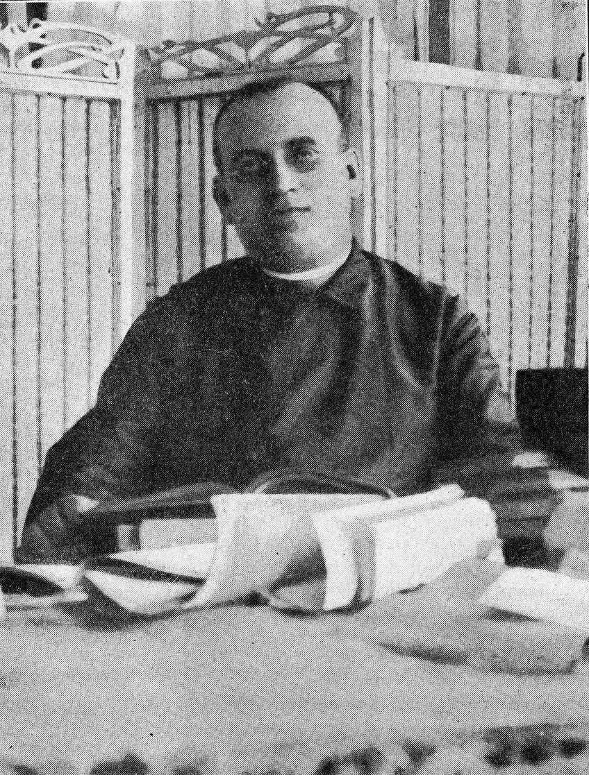 Angel Amor Ruibal, fotografía en Vida Gallega 1930